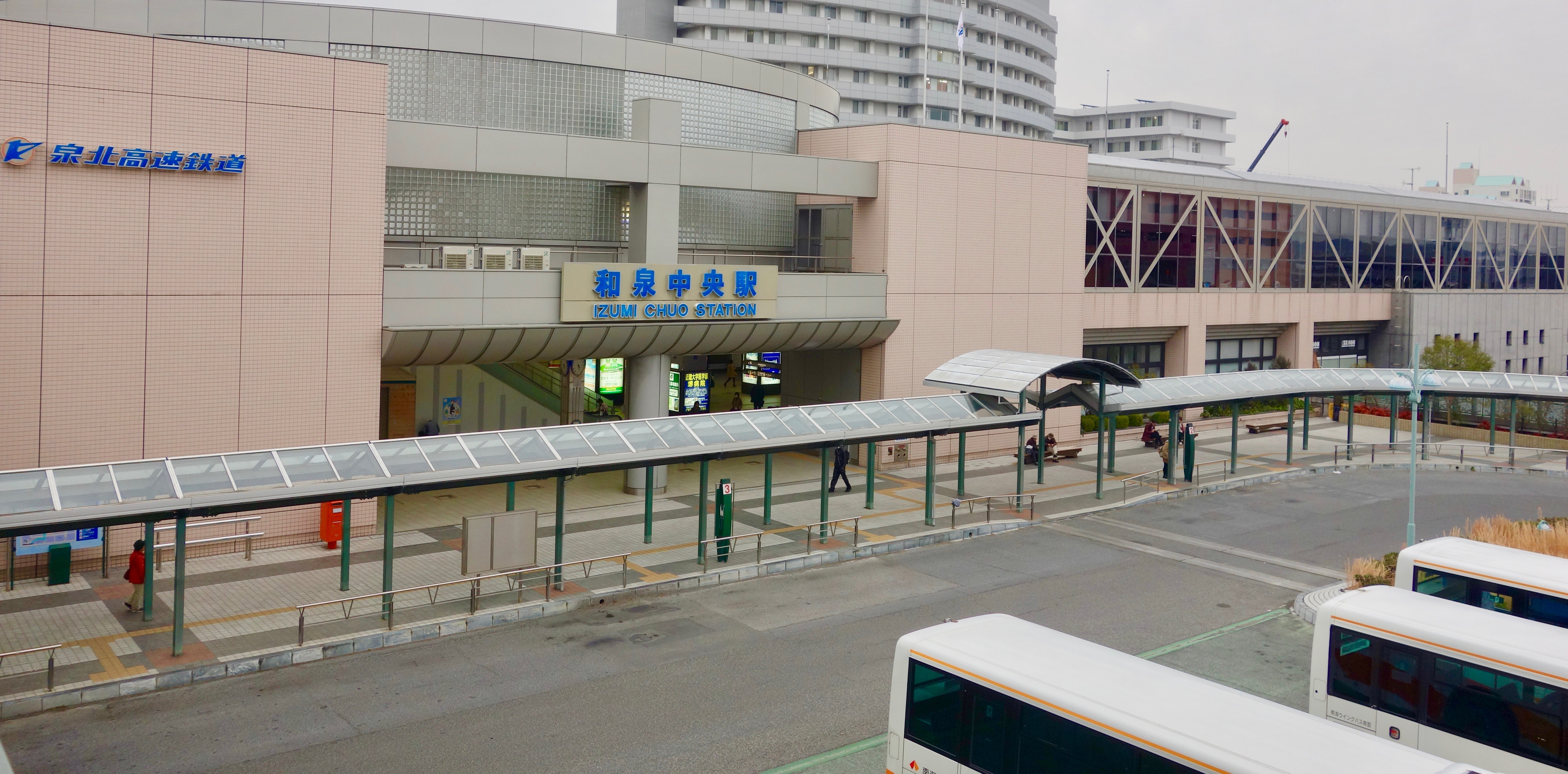 和泉中央駅